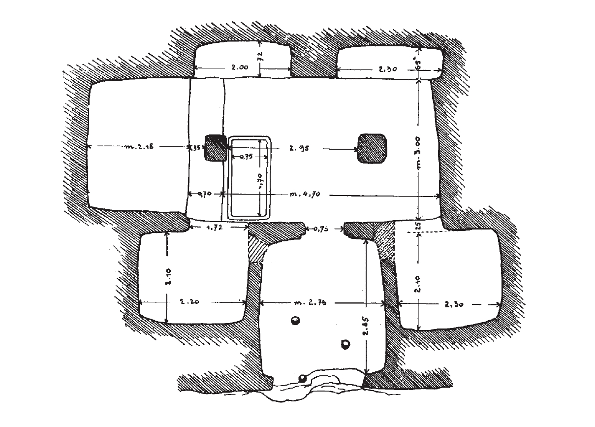 Disegno di Antonio Taramelli